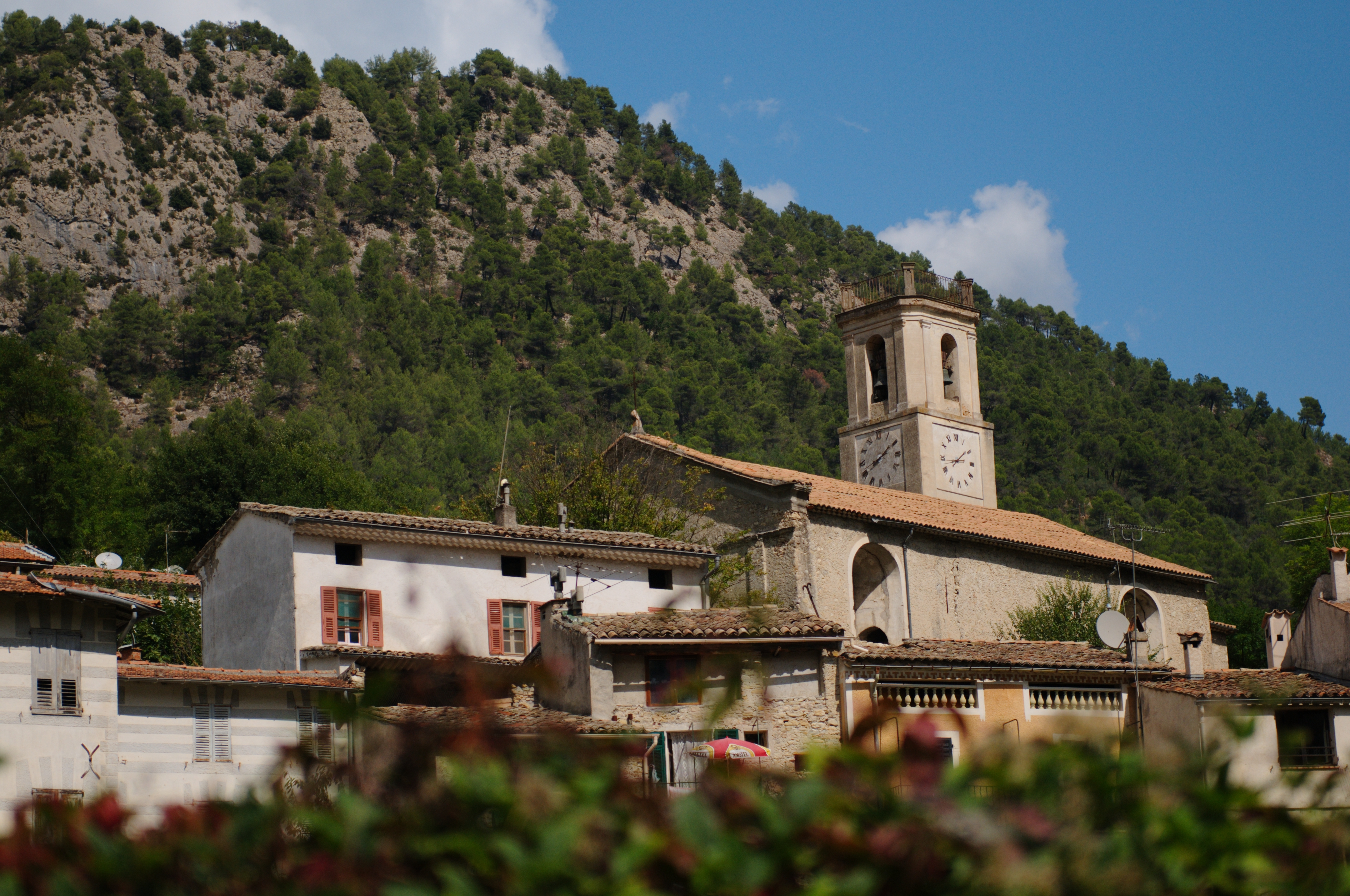 Photo de Roquesteron